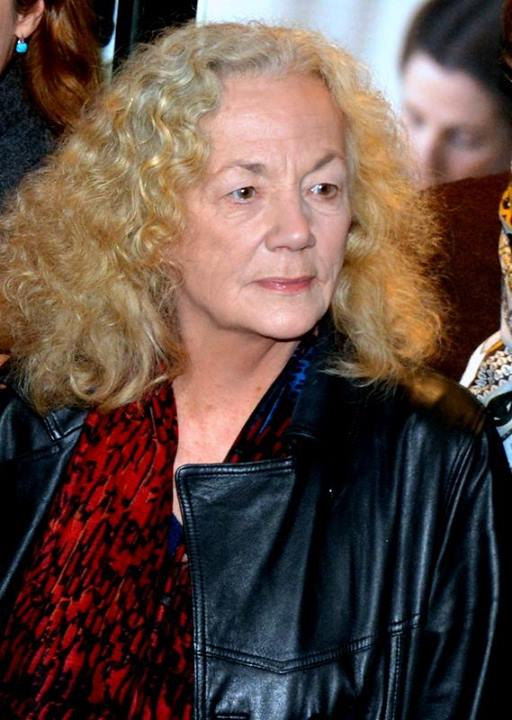 Catherine Hiegel à l'avant-première du film "Violette".